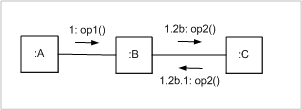 Communication diagram